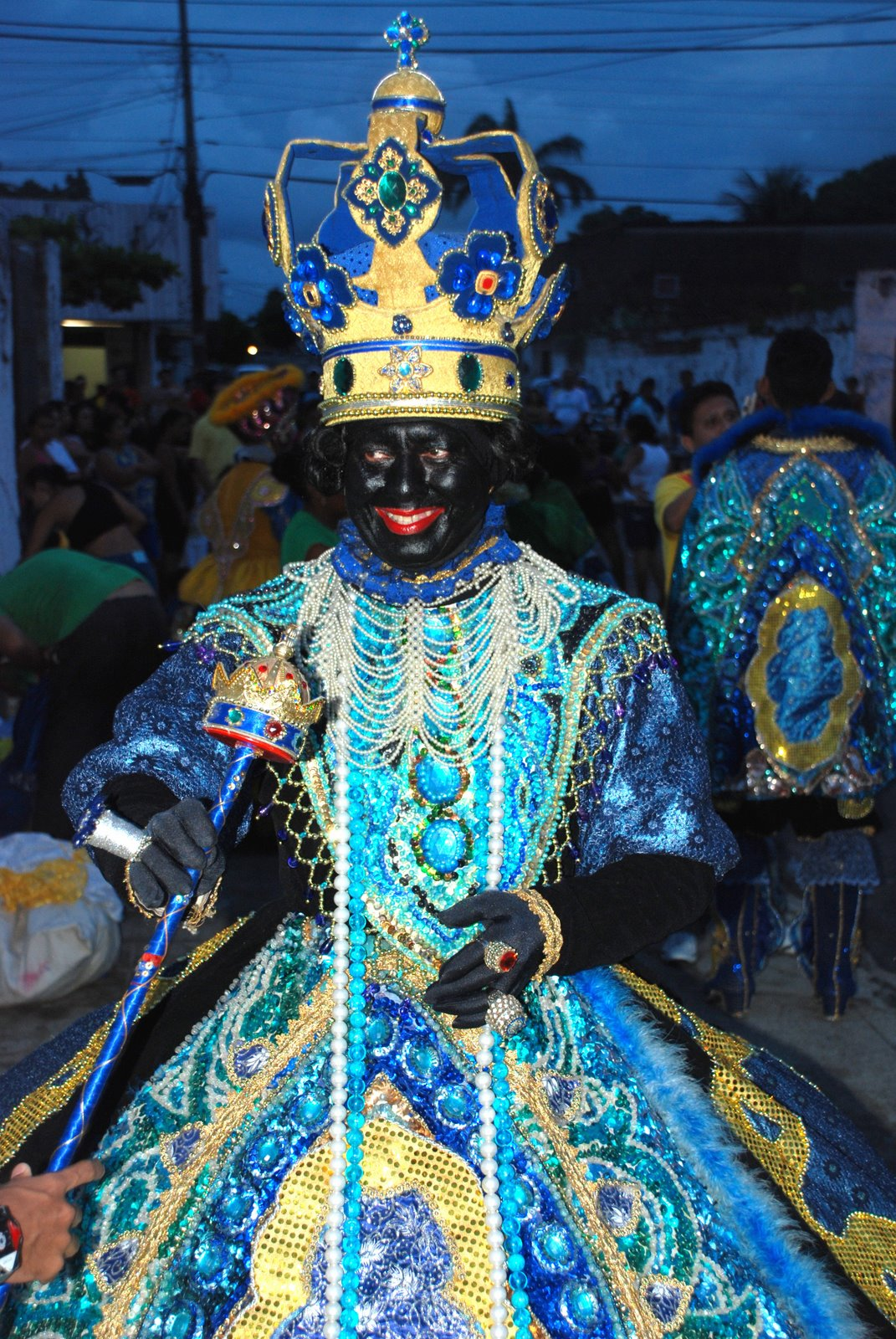 Maracatu Blackface Queen - Caucaia, Ceará, Brazil - February 2009